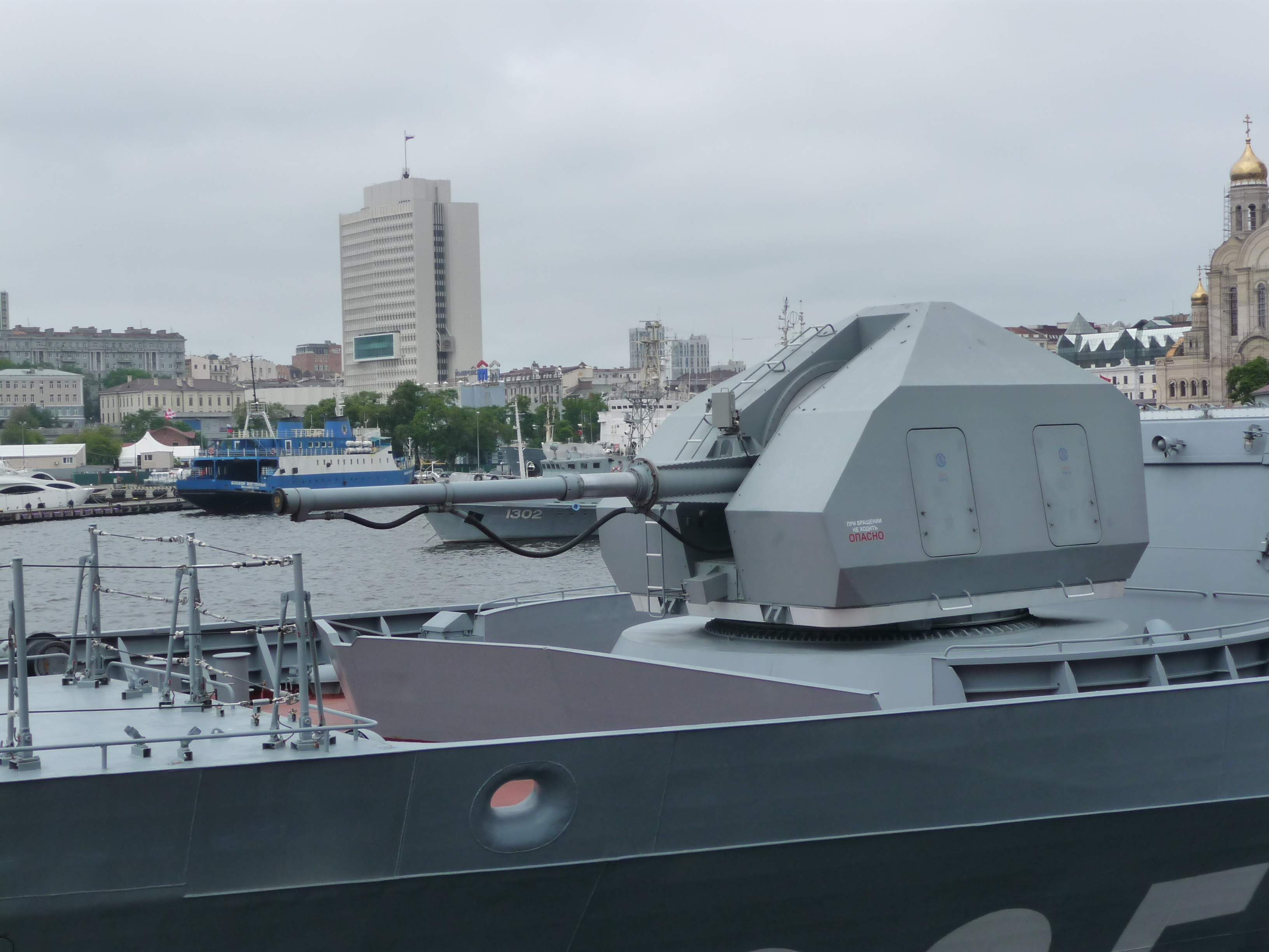 Артиллерийская установка А-190 на корвете «Громкий», Владивосток, 33-й причал, 2019-06-11. Фото с борта японского эсминца «Судзунами»